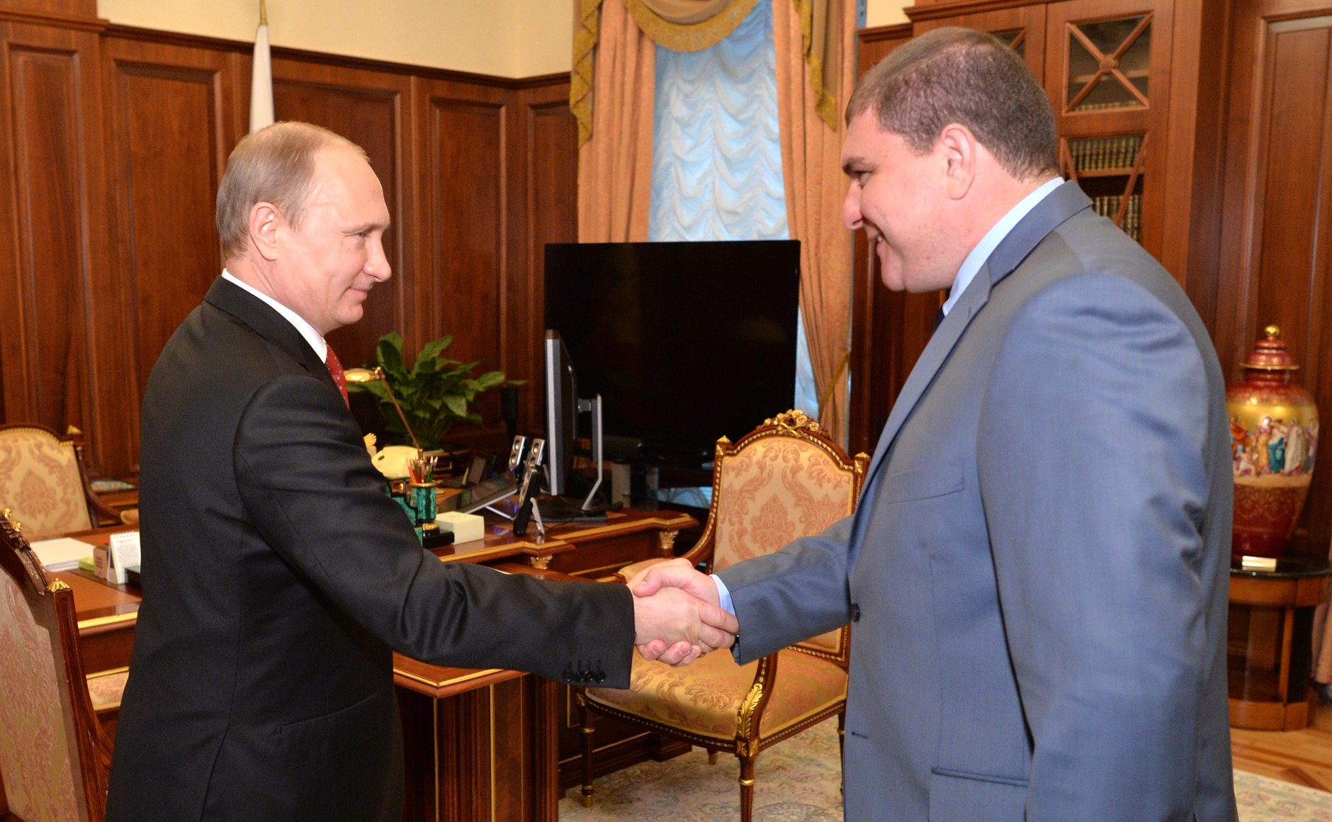 Встреча Владимира Путина с губернатором Орловской области Вадимом Потомским.